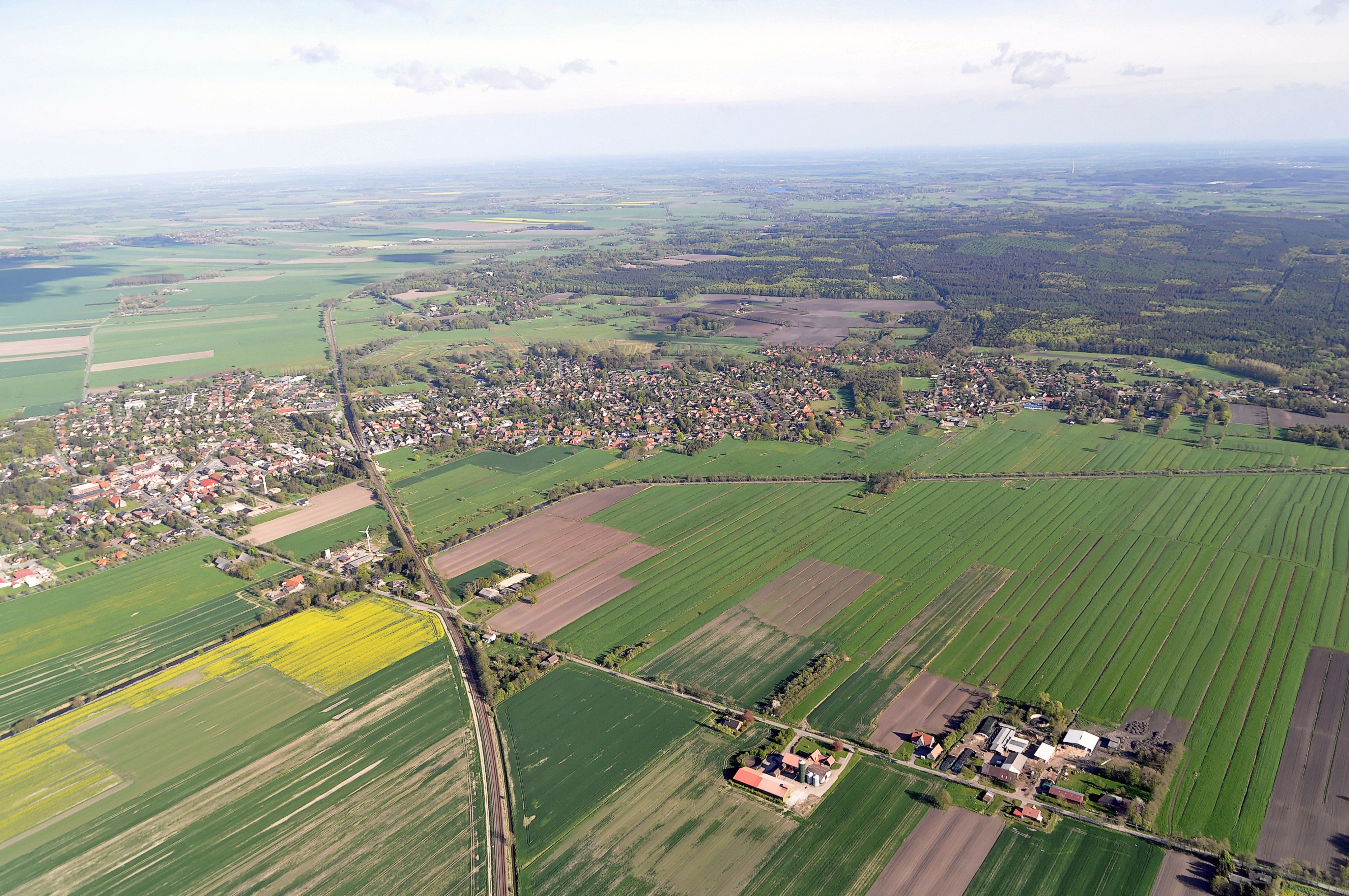 Luftbilder von der Nordseeküste 2012-05